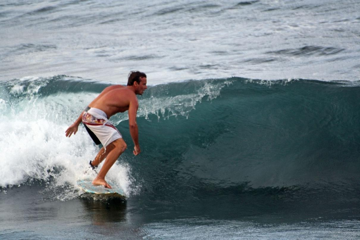 Surfeur sur le spot du Moule en Guadeloupe